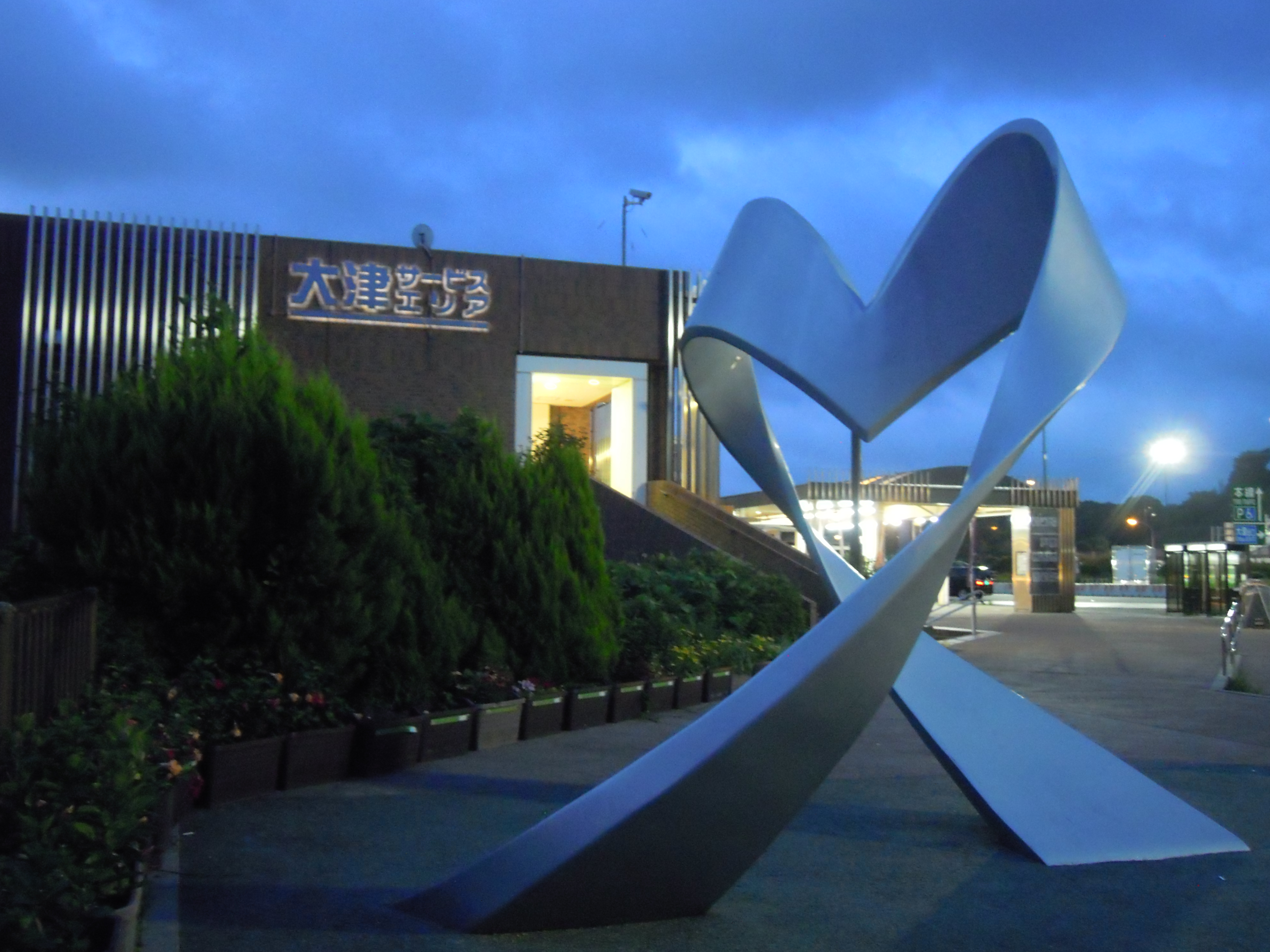 大津サービスエリアで早朝に撮影。